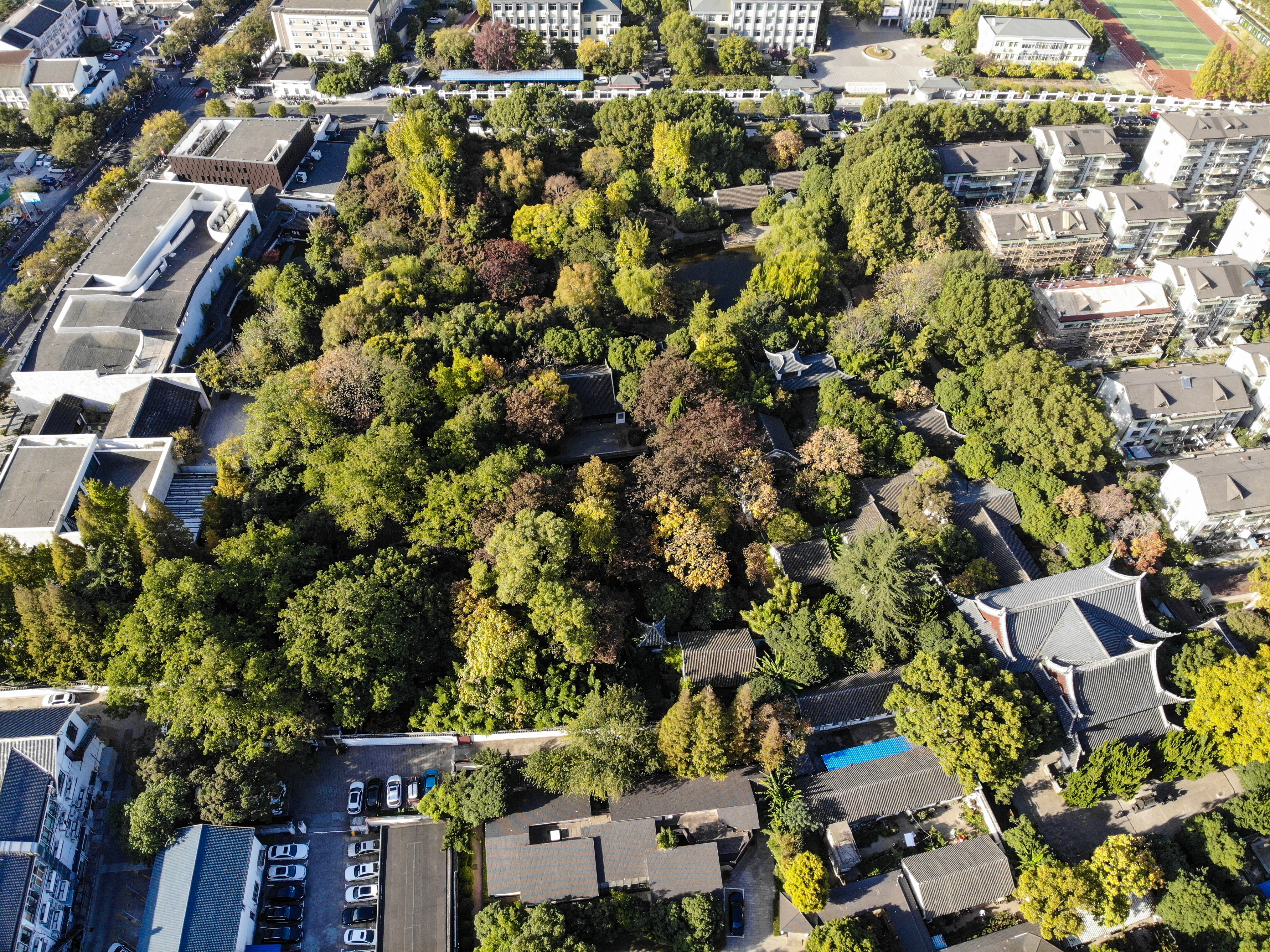 中文（中国大陆）: 秋霞圃 嘉定镇